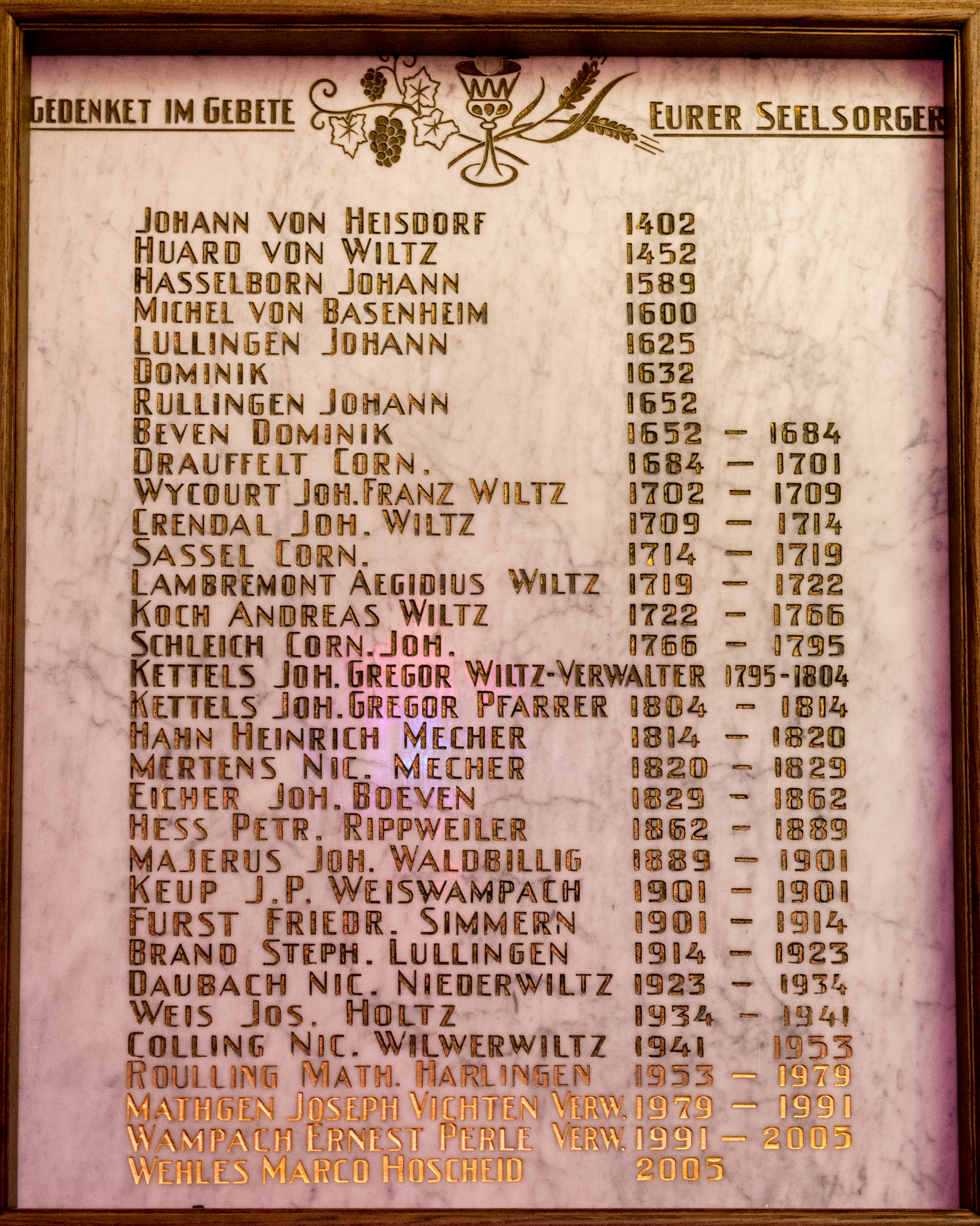 D'Series pastorum an der Géisdrefer Kierch.